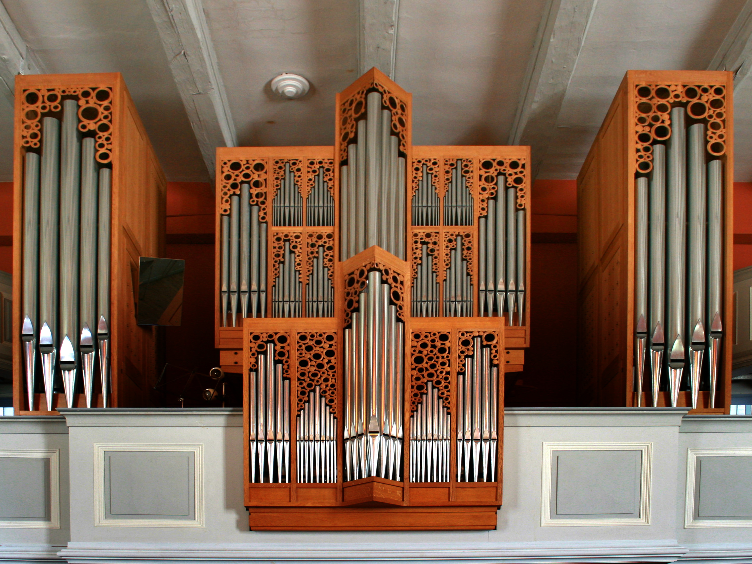 Kirche St. Peter und Paul, Friedenstraße in Schneverdingen